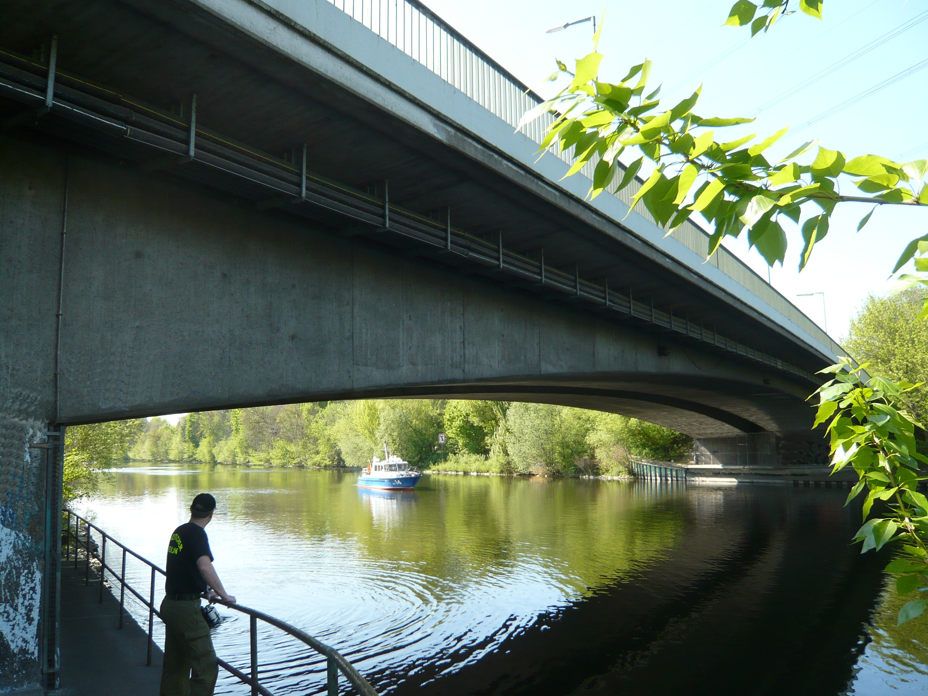 Berlin; Rohrdammbrücke (7)